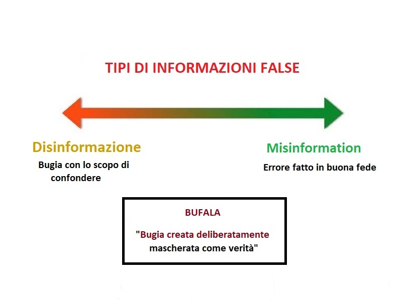 Differenza tipi di informazione